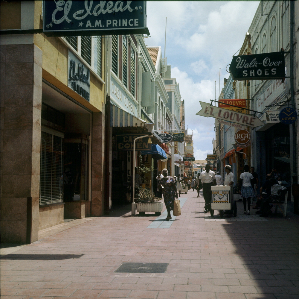 Dia.